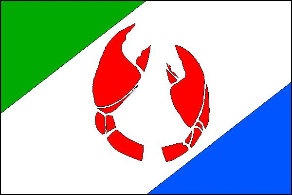 Vlajka obce Heroltice